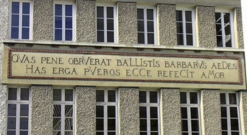 Distique sur un des côtés du bâtiment des dortoirs de Saint-Joseph deReims